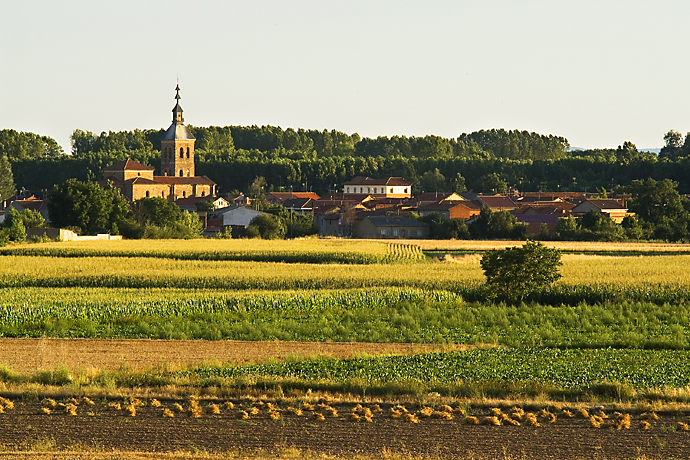 Villarejo de Orbigo, Leon, Spain